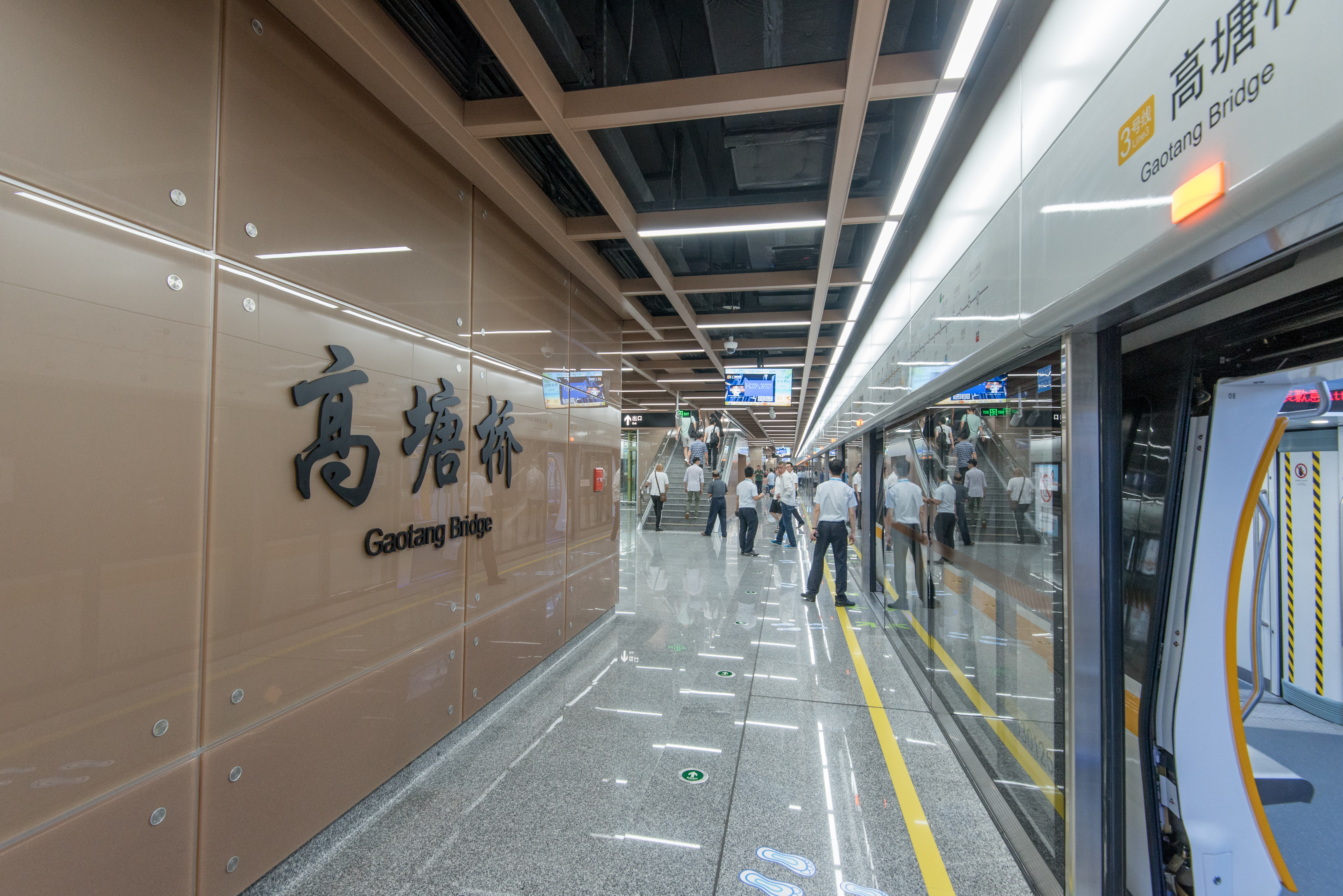 宁波地铁高塘桥站